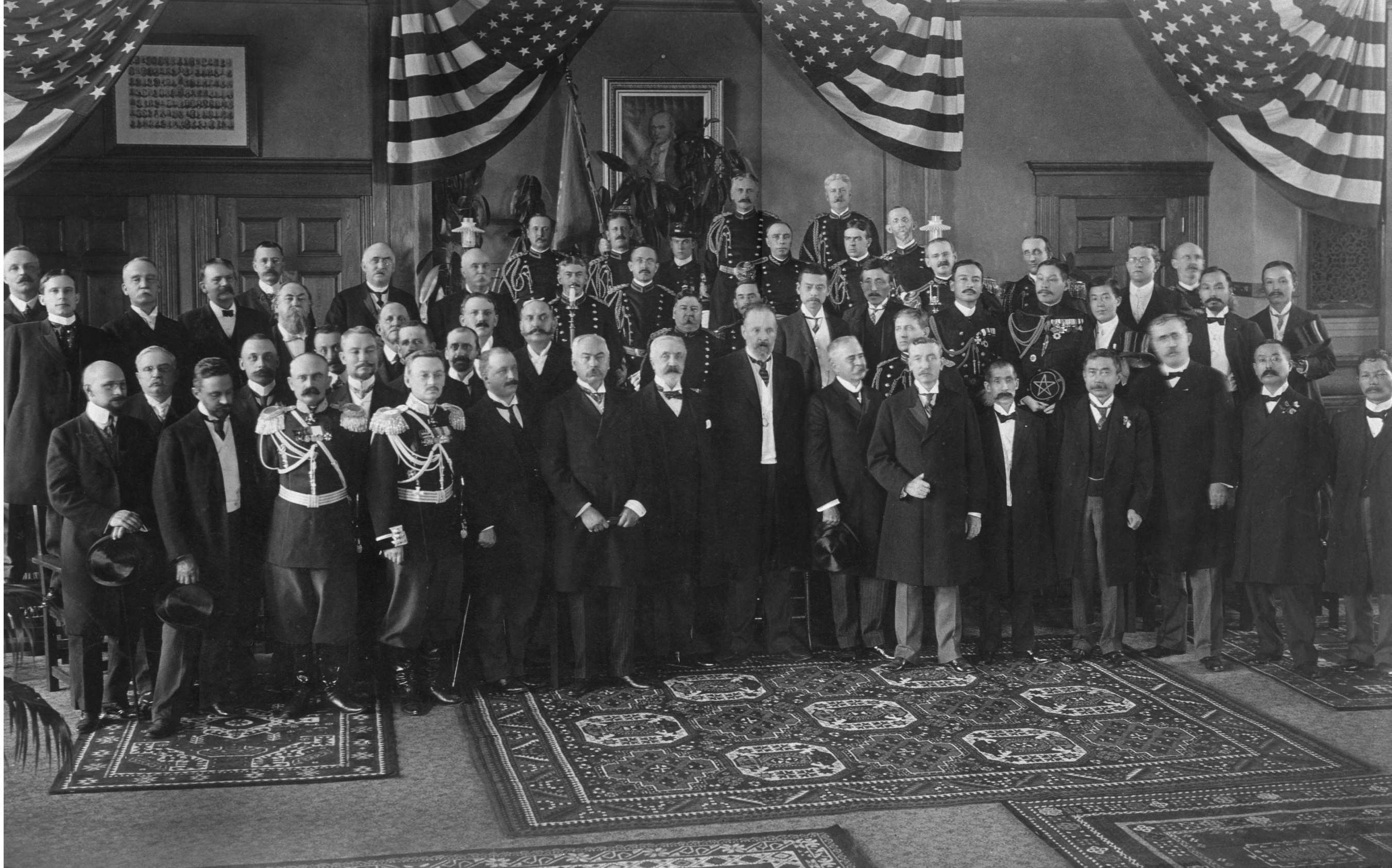 Empfang der russischen und der japanischen Delegationen zu den Verhandlungen zum Frieden von Portsmouth im Jahr 1905